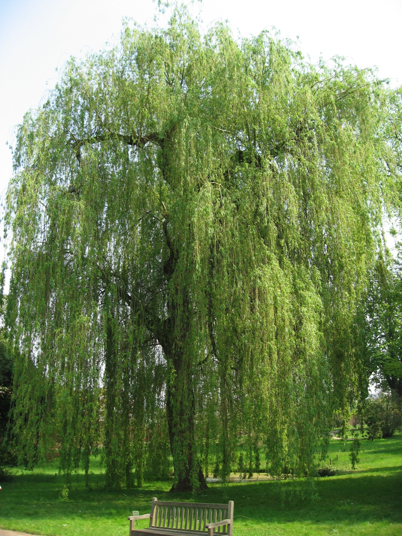 Salix × sepulcralis 'Chrysocoma' (syn. Salix alba 'Tristis') (Saule pleureur doré) in Arboretum de la Vallée-aux-Loups Map: 48° 46' 22" N 2° 16' 5" E